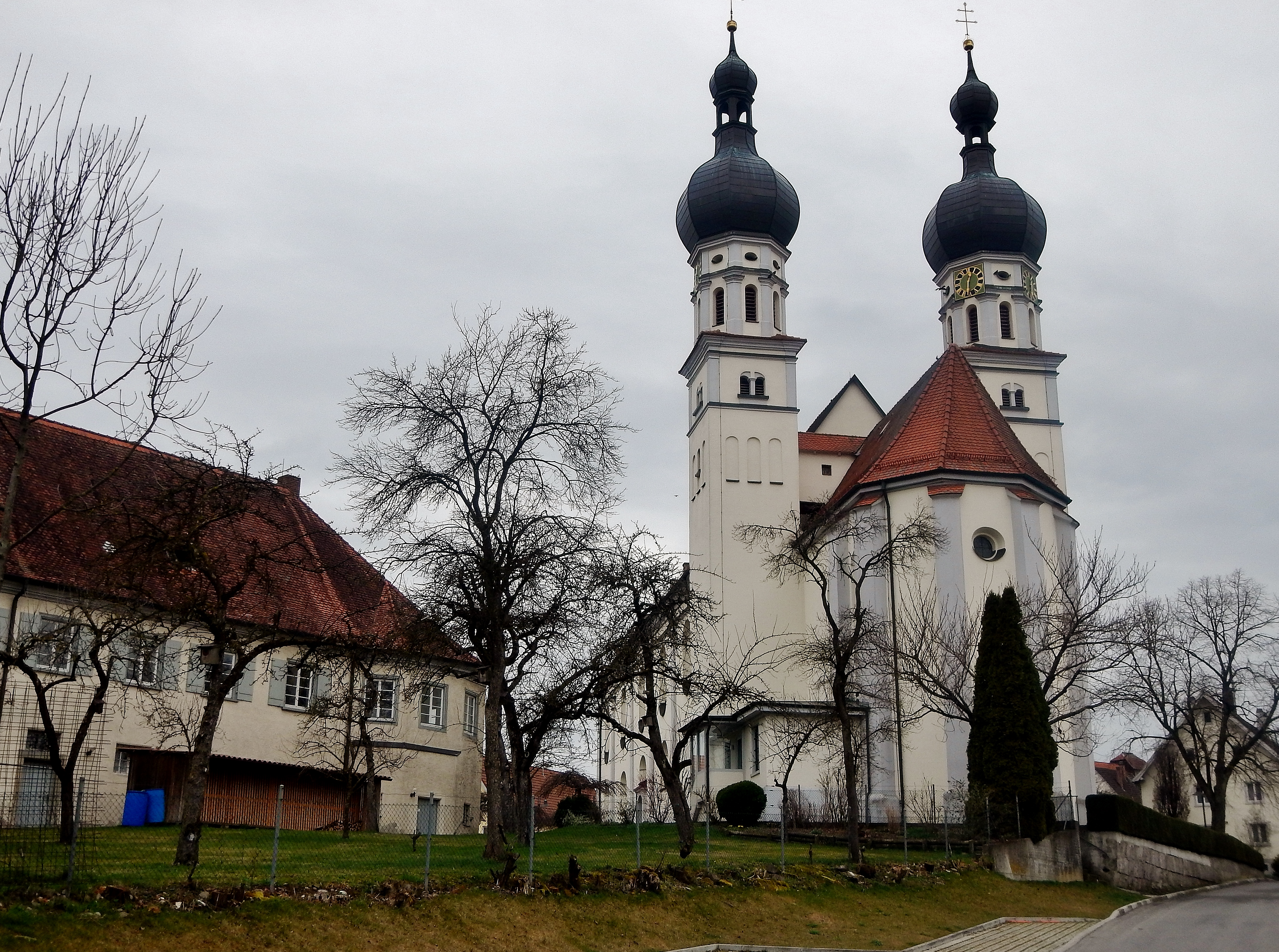 Pfarrkirche St. Simon & Judas mit den beiden barocken zwiebelförmigen Kirchtürmen